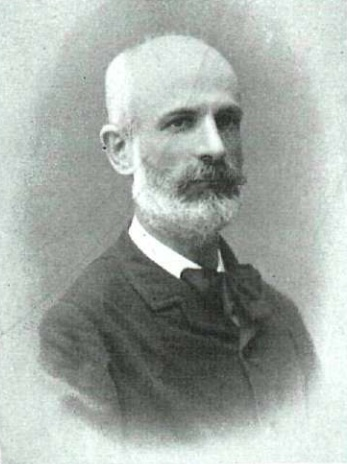 Francisco Giner de los Ríos en 1881